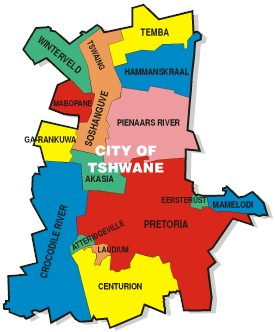 Source site de Tshwane